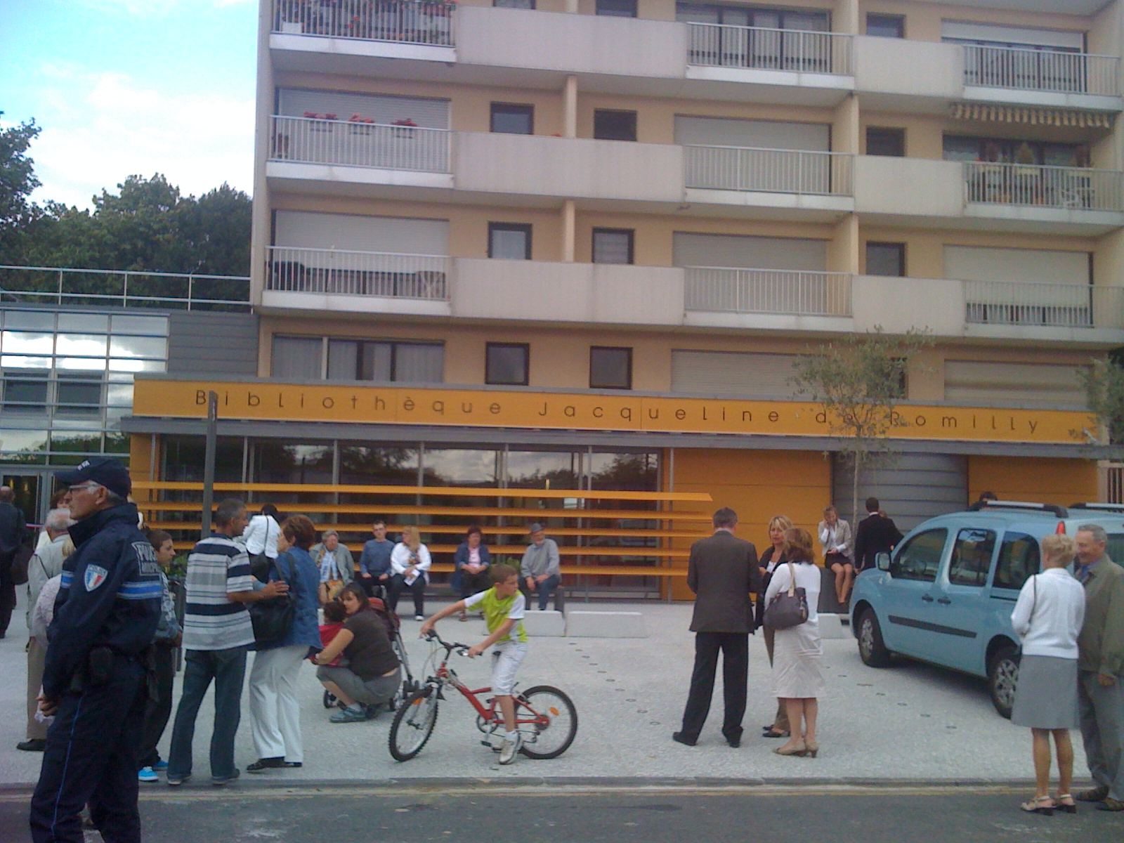 Bibliothèque Jacqueline de Romilly à Crosne, le jour de son inauguration, le 7 septembre 2011